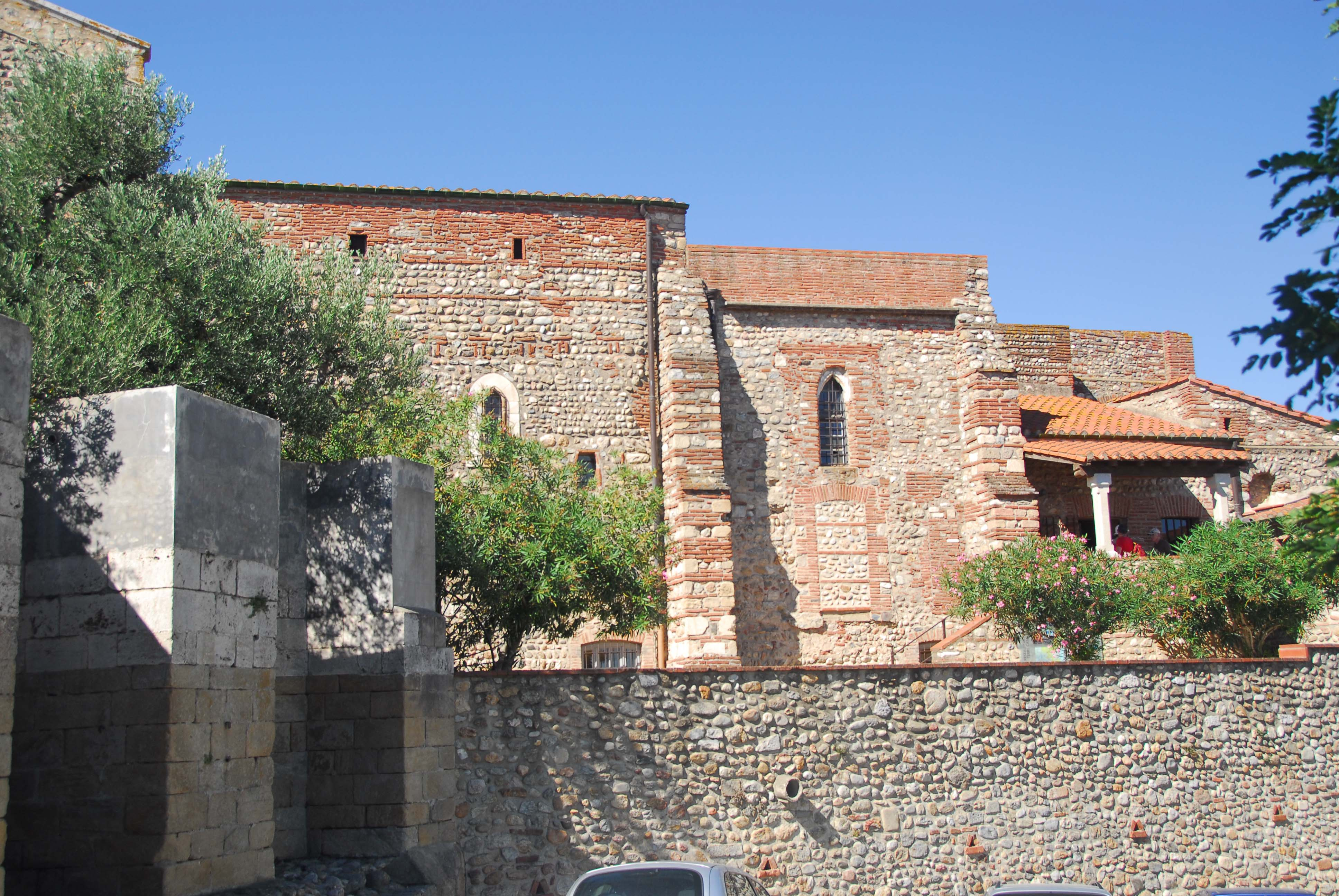 Ste-Eulalie-et-Ste-Julie_d’Elne, Konventsgebäude von O